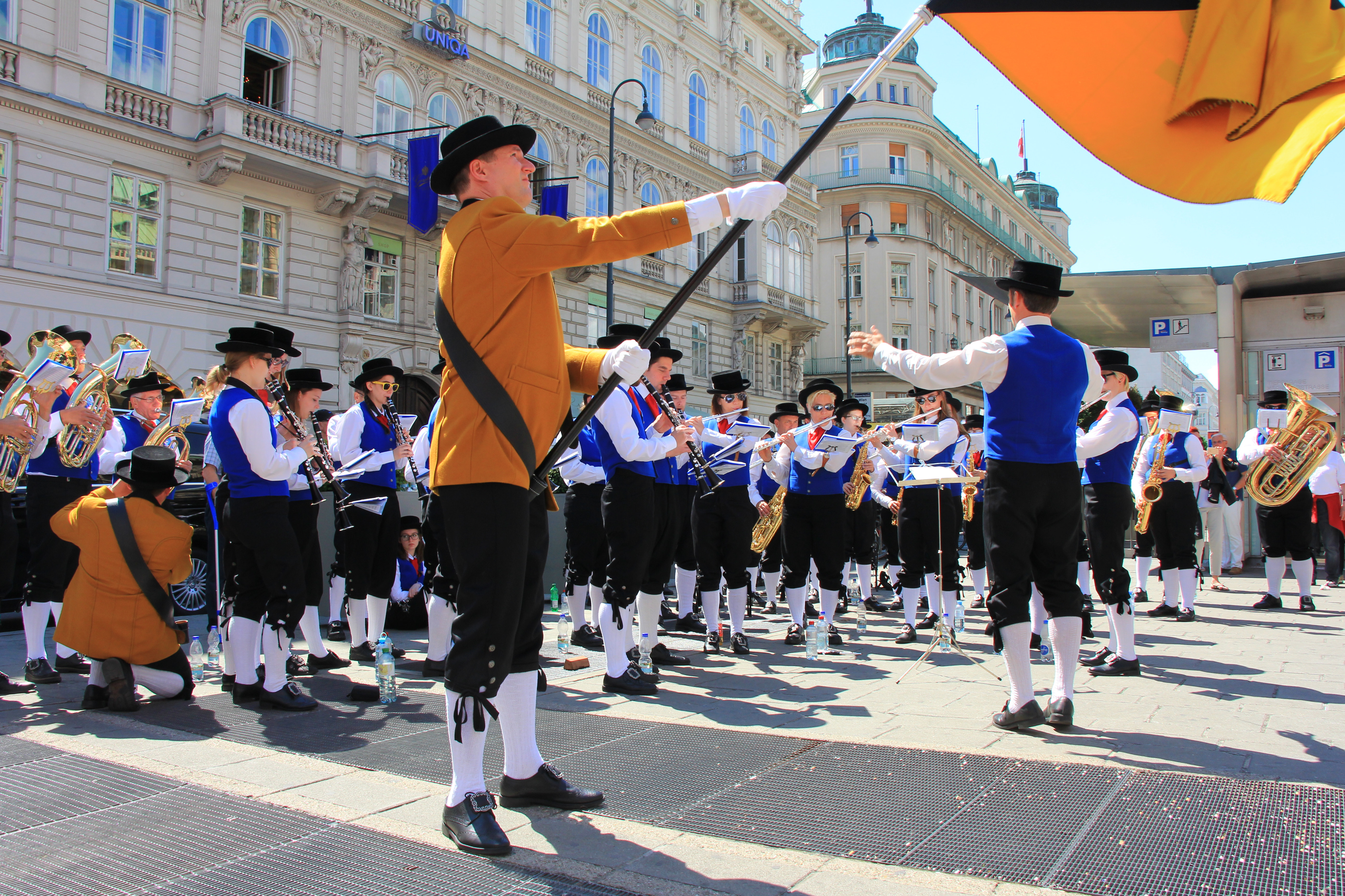 Auftritt des Musikvereins Konkordia Mauren in Liechtenstein in Wien am Herbert von Karajan-Platz im Rahmen des Österreichischen Blasmusikfestes 2017